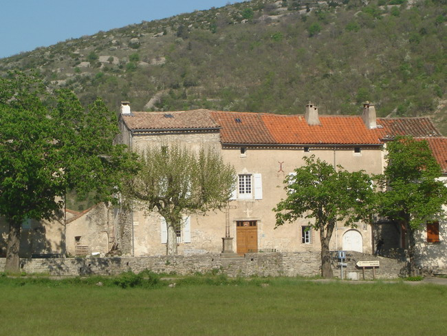 Corps de logis XVIIème du Château de Vissec